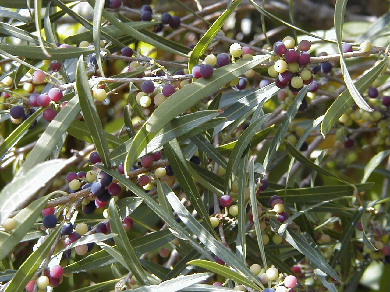 Phillyrea angustifolia, frutos. Real Jardín Botánico de Madrid.